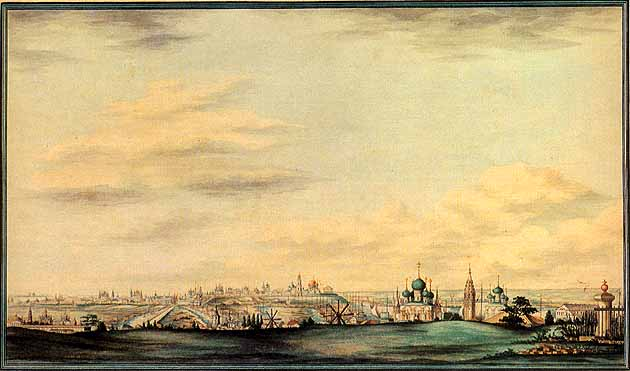 Ярославль. Панорама города с южной стороны. Акварель И. Белоногова. 1846 г.